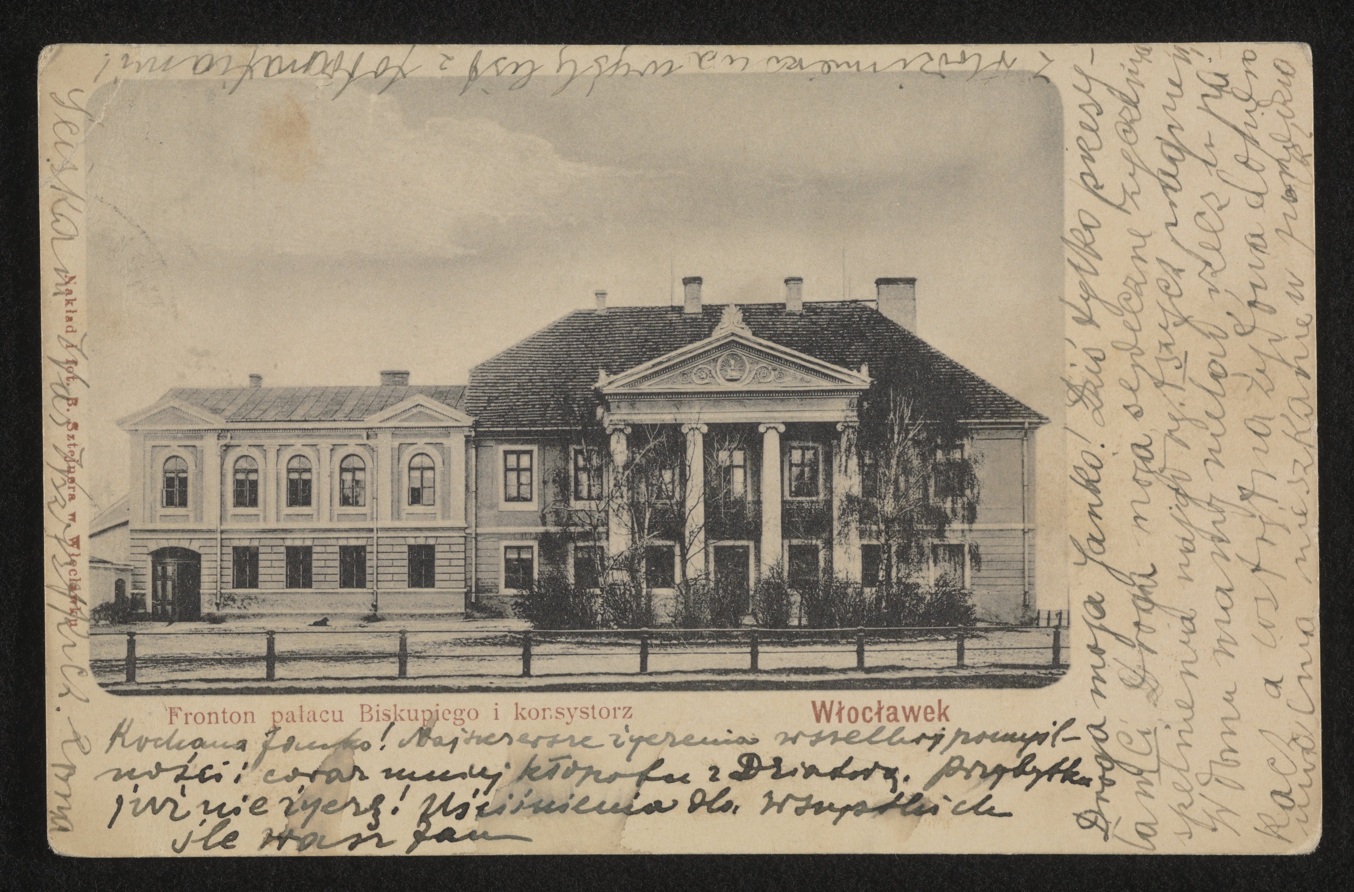 Włocławek, front pałacu Biskupiego 1900-1905 r. pocztówka